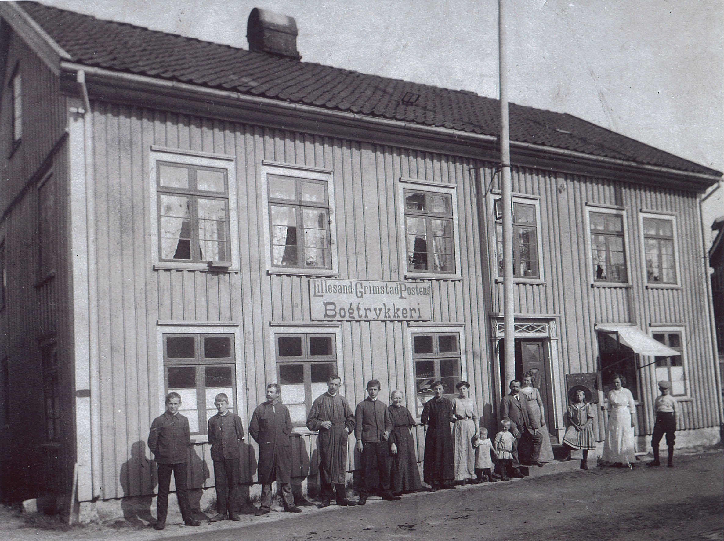 Lillesand-Grimstadpostem-bogtrykkeri